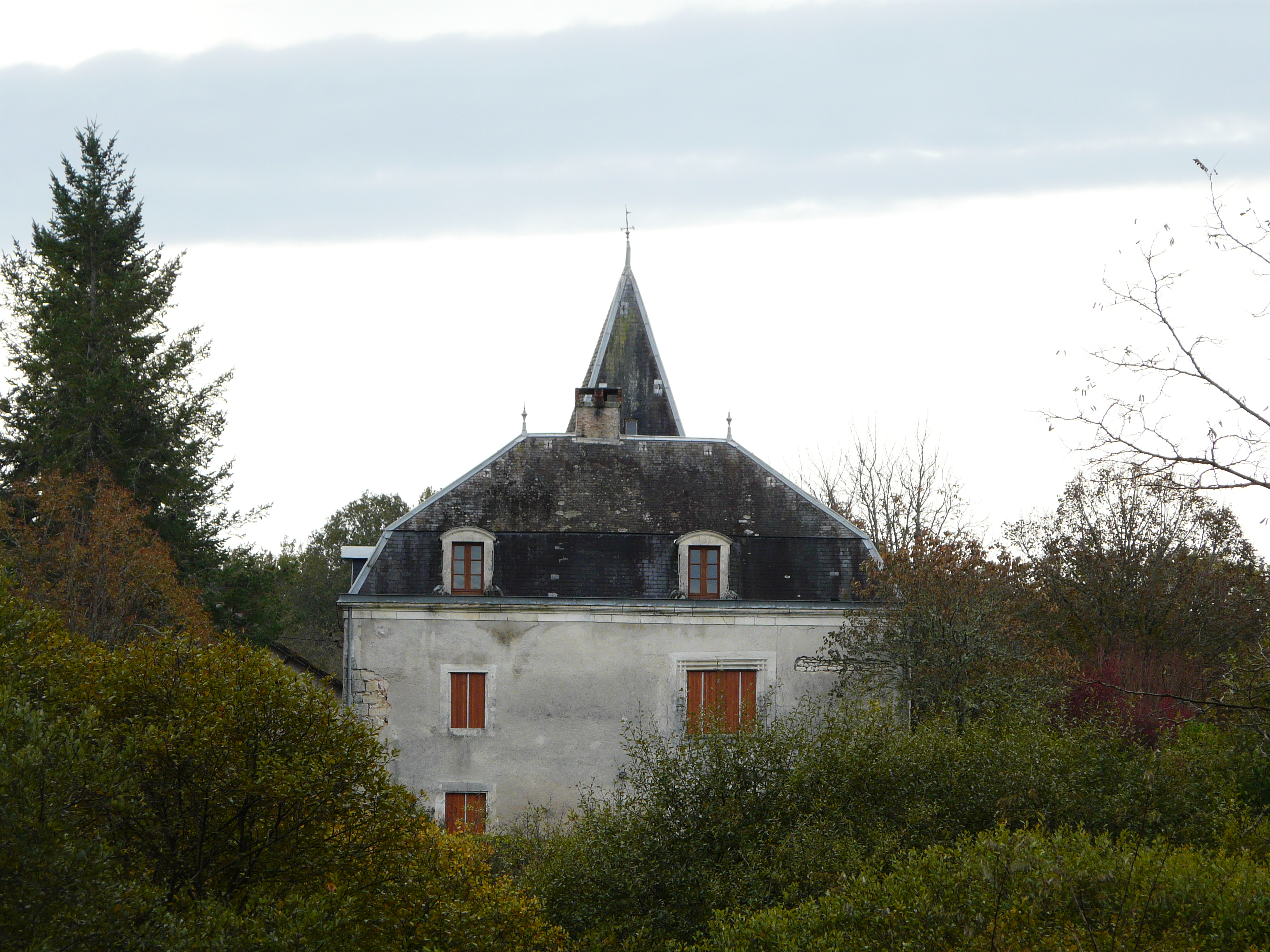 Le château de l'Étang, Limeyrat, Dordogne, France.